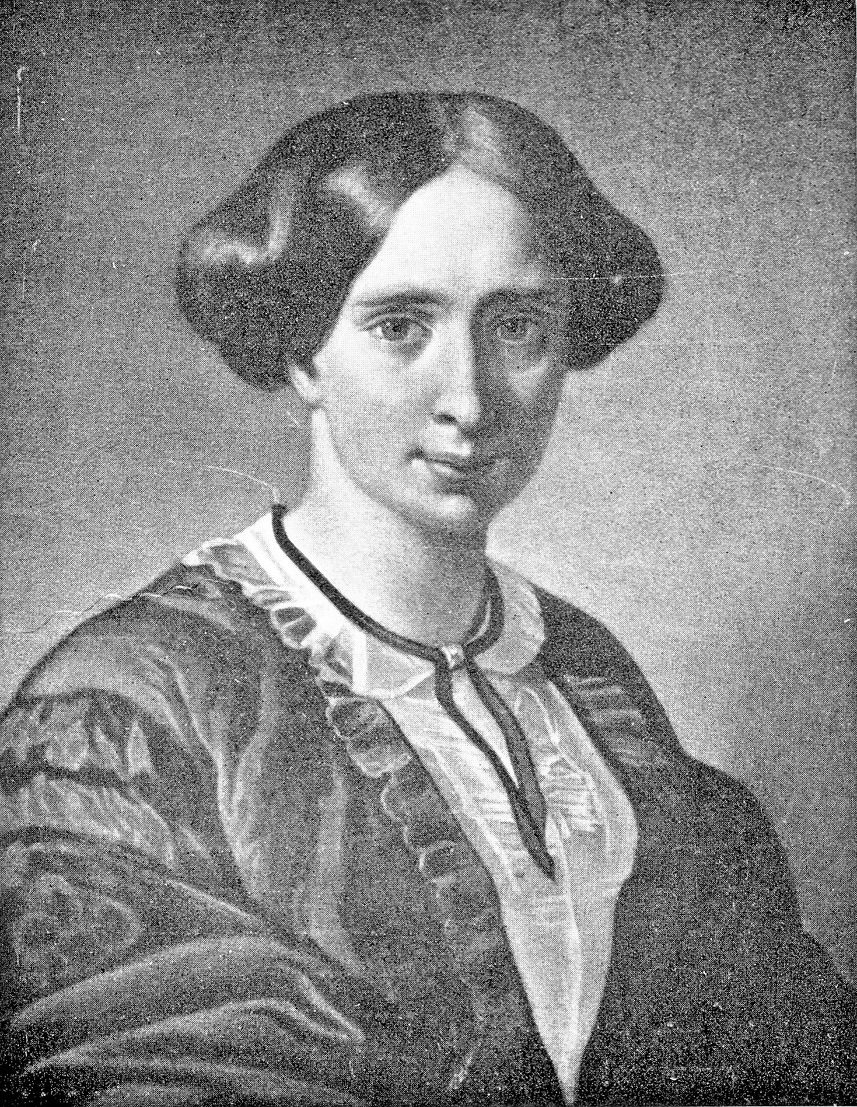 Betty Paoli